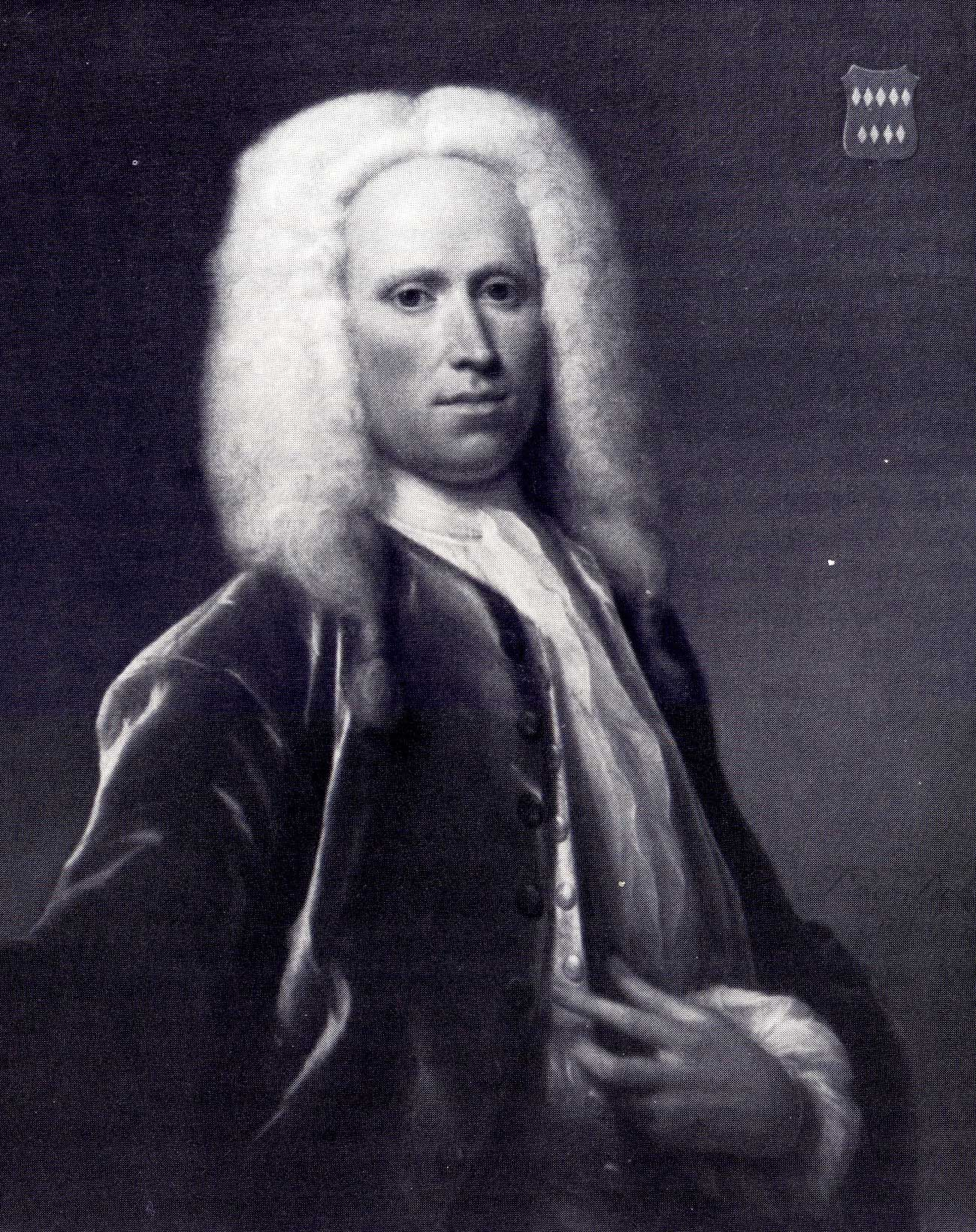 Portret van de Goudse regent Adriaan van der Does (1686-1749)